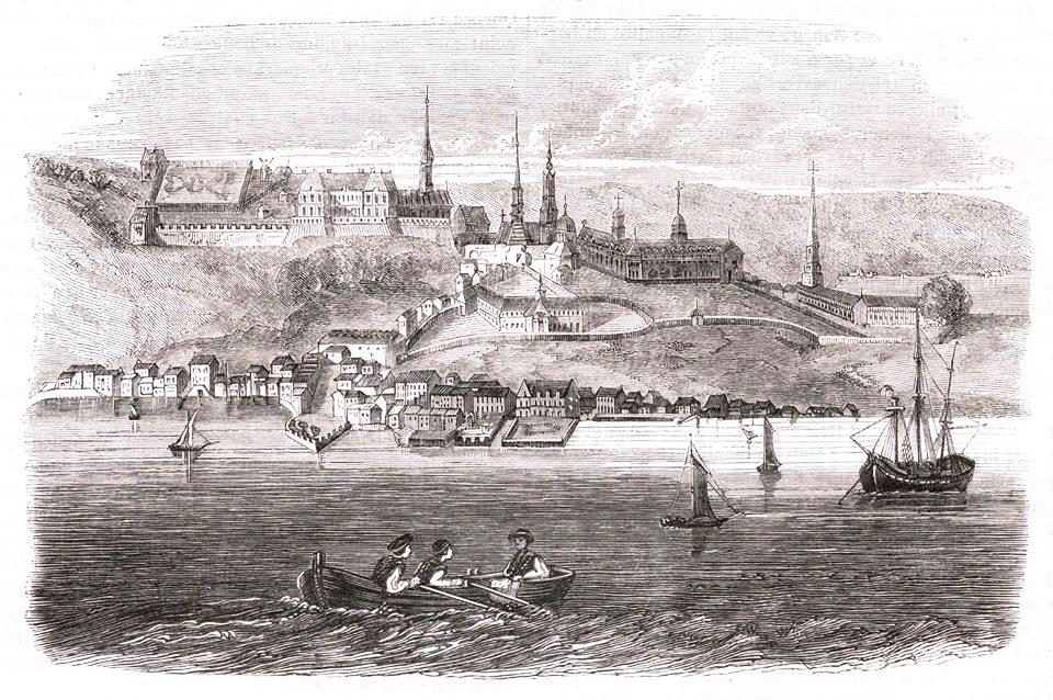 Québec en 1720 « On voit souvent des représentations anciennes de Québec et on a parfois du mal à reconnaître notre ville. C’est que les artistes des XVIIe et XVIIIe siècles rendaient des visions romantiques de ce qu’ils voyaient. Ce courant s’inspirait du Moyen Âge et avait des valeurs chrétiennes assez fortes. C’est ce qui explique que tous les clochers atteignaient des proportions démesurées. Néanmoins, malgré ces distorsions, la ville de 1720 nous est présentée avec ses principaux points de repère de l’époque. En plein centre de l’image se trouve le palais épiscopal de la côte de la Montagne. En suivant le mur de fortifications vers la droite, on aboutit à l’Hôtel-Dieu. En remontant vers la gauche, on croise le séminaire, la basilique Notre-Dame, la chapelle des Jésuites puis celle des Récollets. Juste à l’avant de cette dernière, on reconnaît le château Saint-Louis juché en haut de la falaise et, à sa gauche, le jardin du gouverneur. Entre les deux apparaît le moulin du mont Carmel. Sur la rive du fleuve, vis-à-vis le château, se dresse la batterie Royale et, à sa gauche, l’anse du Cul-de-Sac. Cette gravure a été publiée à Paris en 1843 dans le magazine «Le Magasin pittoresque». » – Société historique de Québec